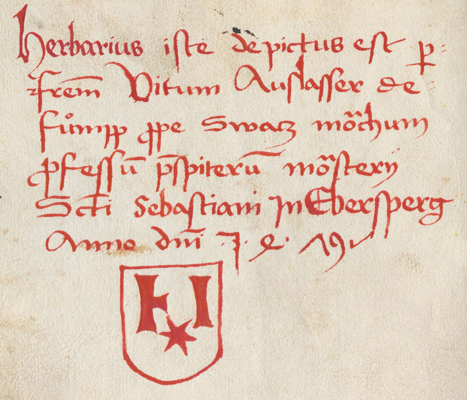 Titelblatt